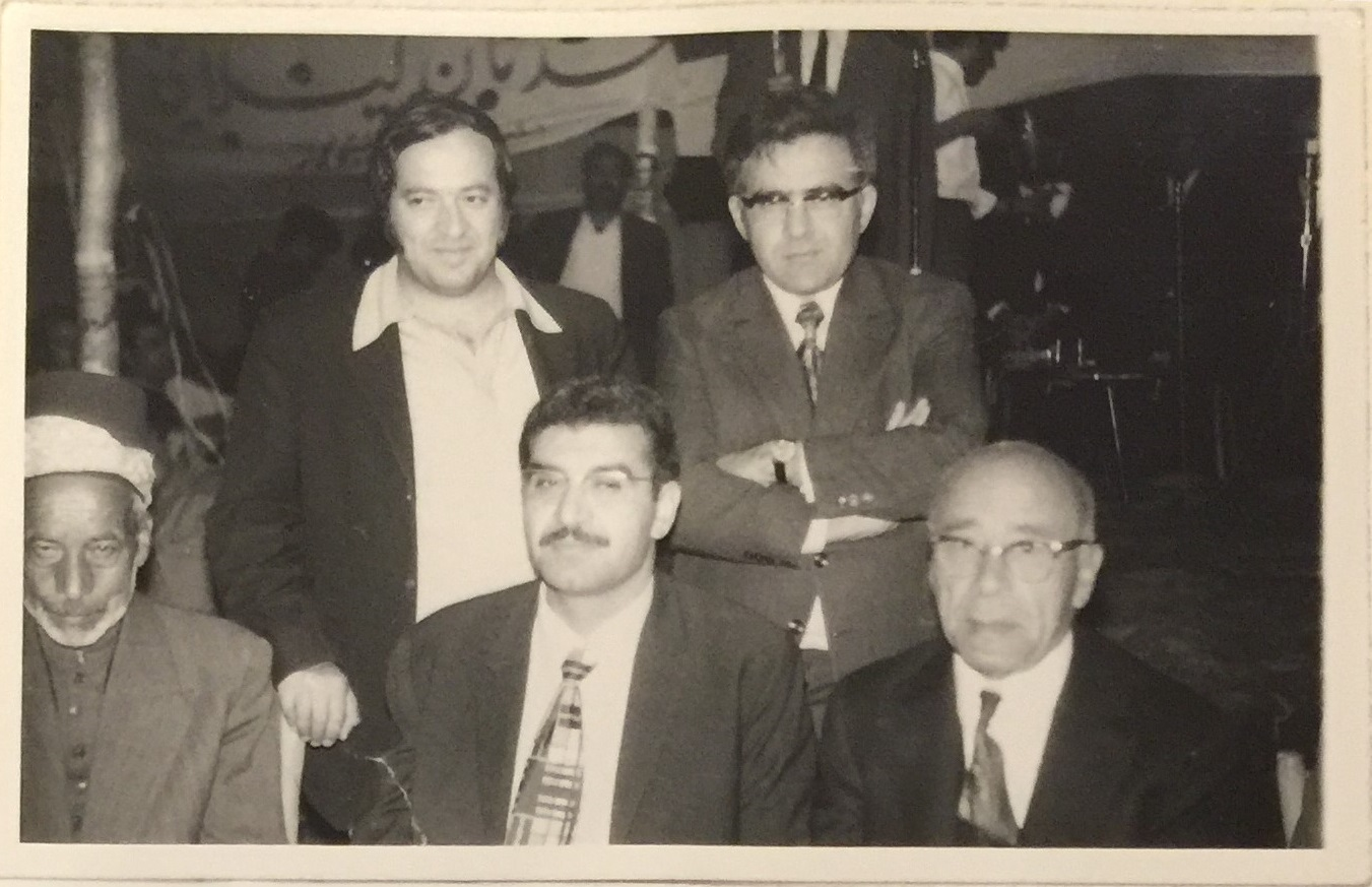 أنور كامل في انتخابات مجلس الشعب